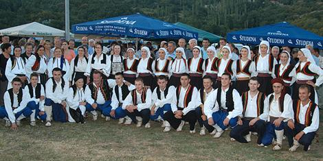 KUD "Brda" Izbično.